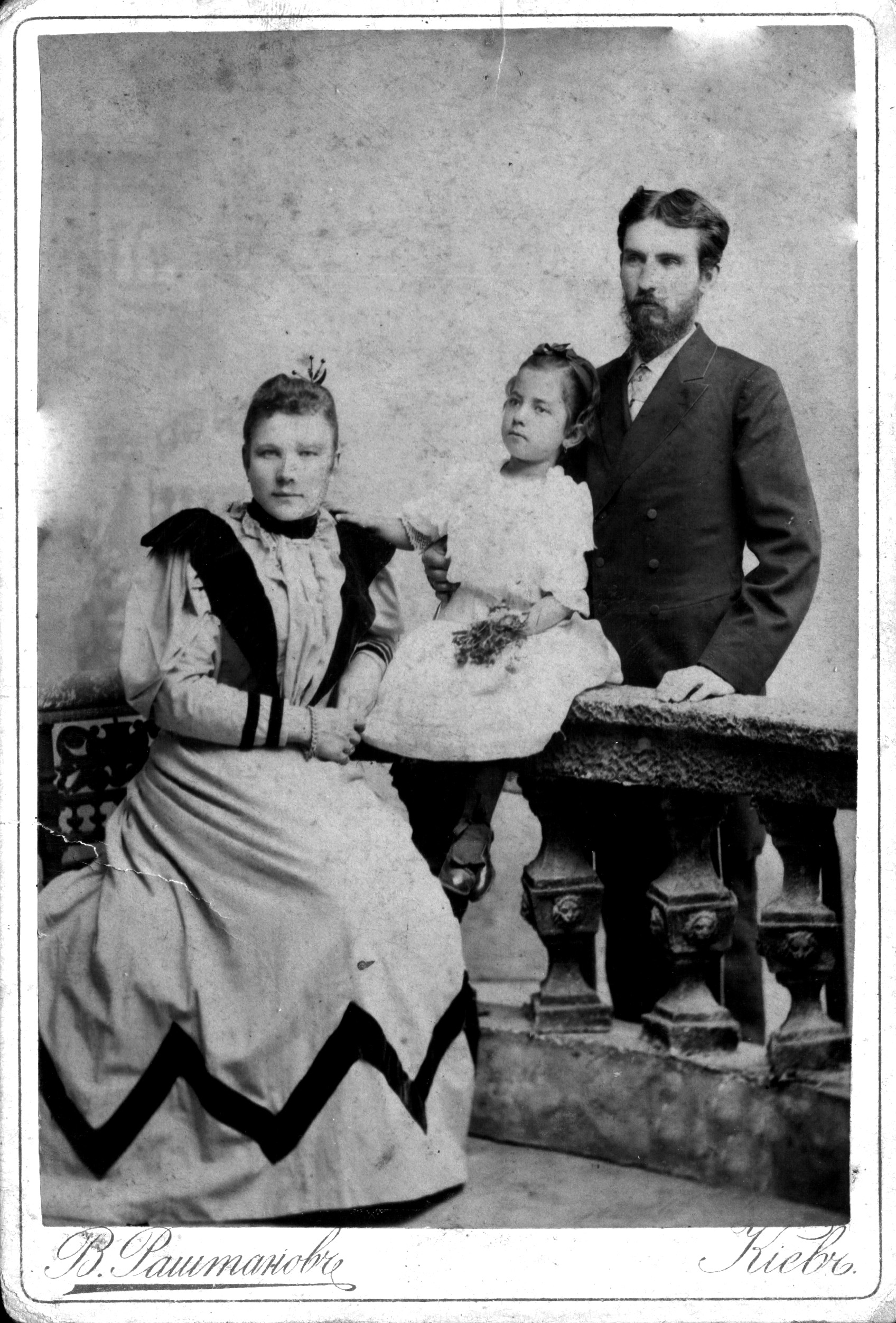 Лидия Зоркиди (Левковская) с родителями